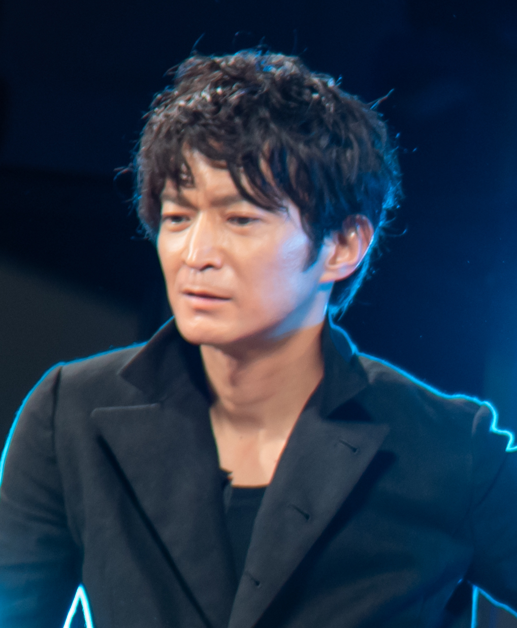 Kenjiro Tsuda